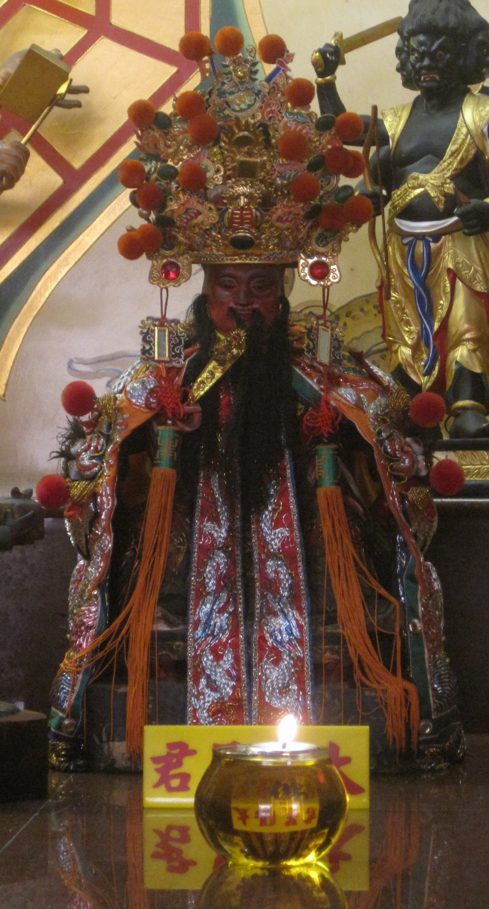 臺南開基三官廟的太陽星君神像